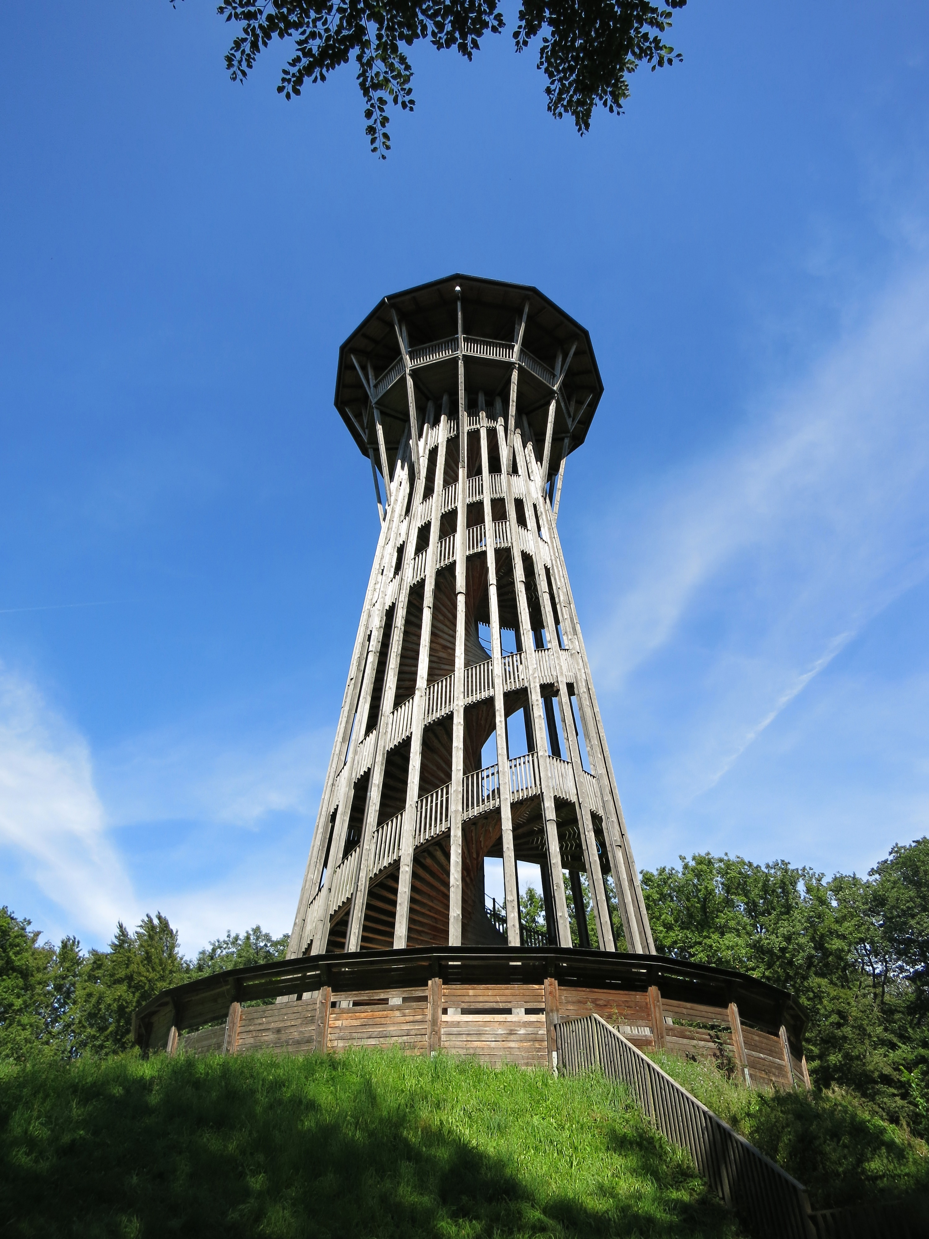 Sauvabelin Turm